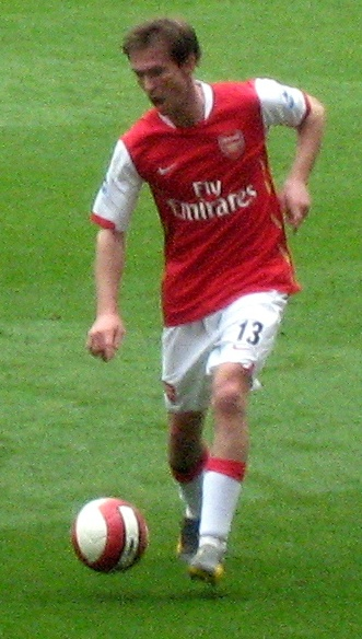 Hleb